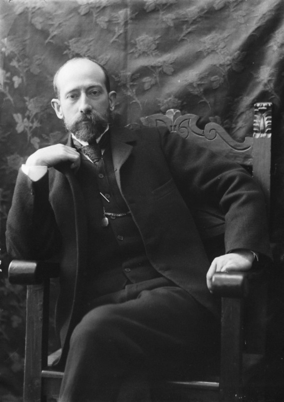 Domenico Trentacoste fotografato da Mario Nunes Vais